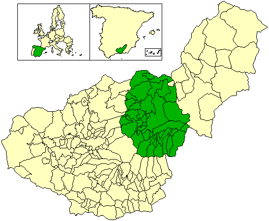 Mapa del partido judicial de Guadix, en la provincia de Granada (España)